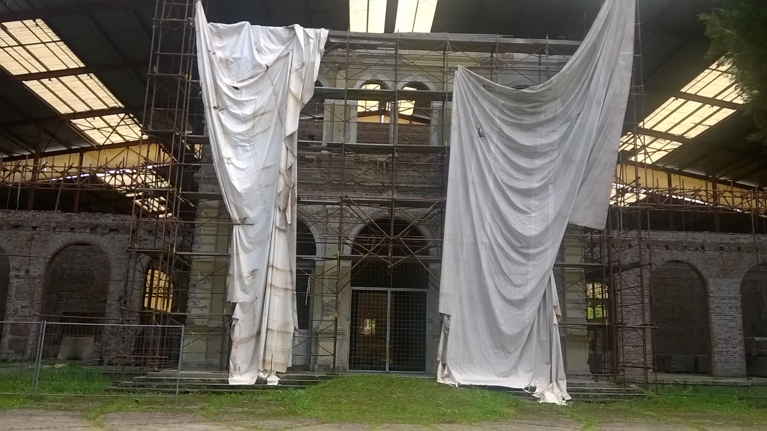 Kursalon Lipik, restaurierung der Kriegsschäden